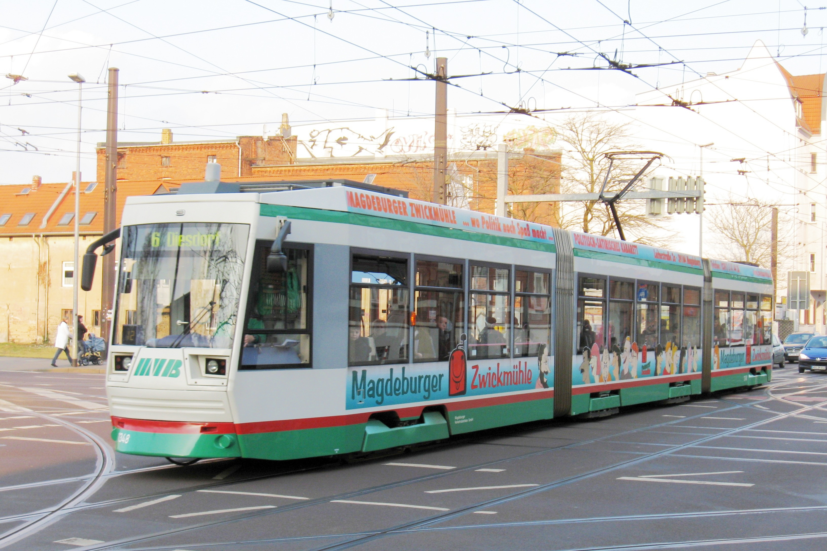 Magdeburg: NGT8D am Westring in Magdeburg.